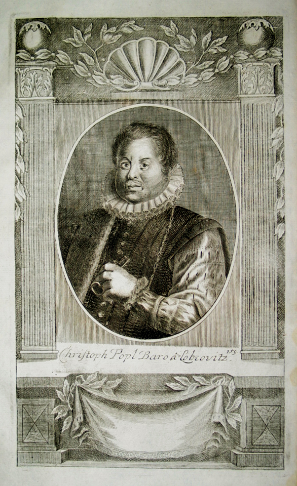 Christoph von Lobkowitz (1545-1609): Christoph Popl Baro a Lobkovitz. Kaiserlicher Rat.